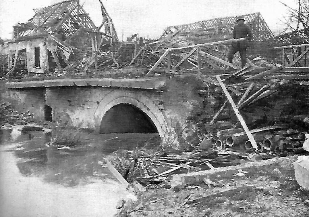 Avre-Brücke zwischen Moreuil und Morisel